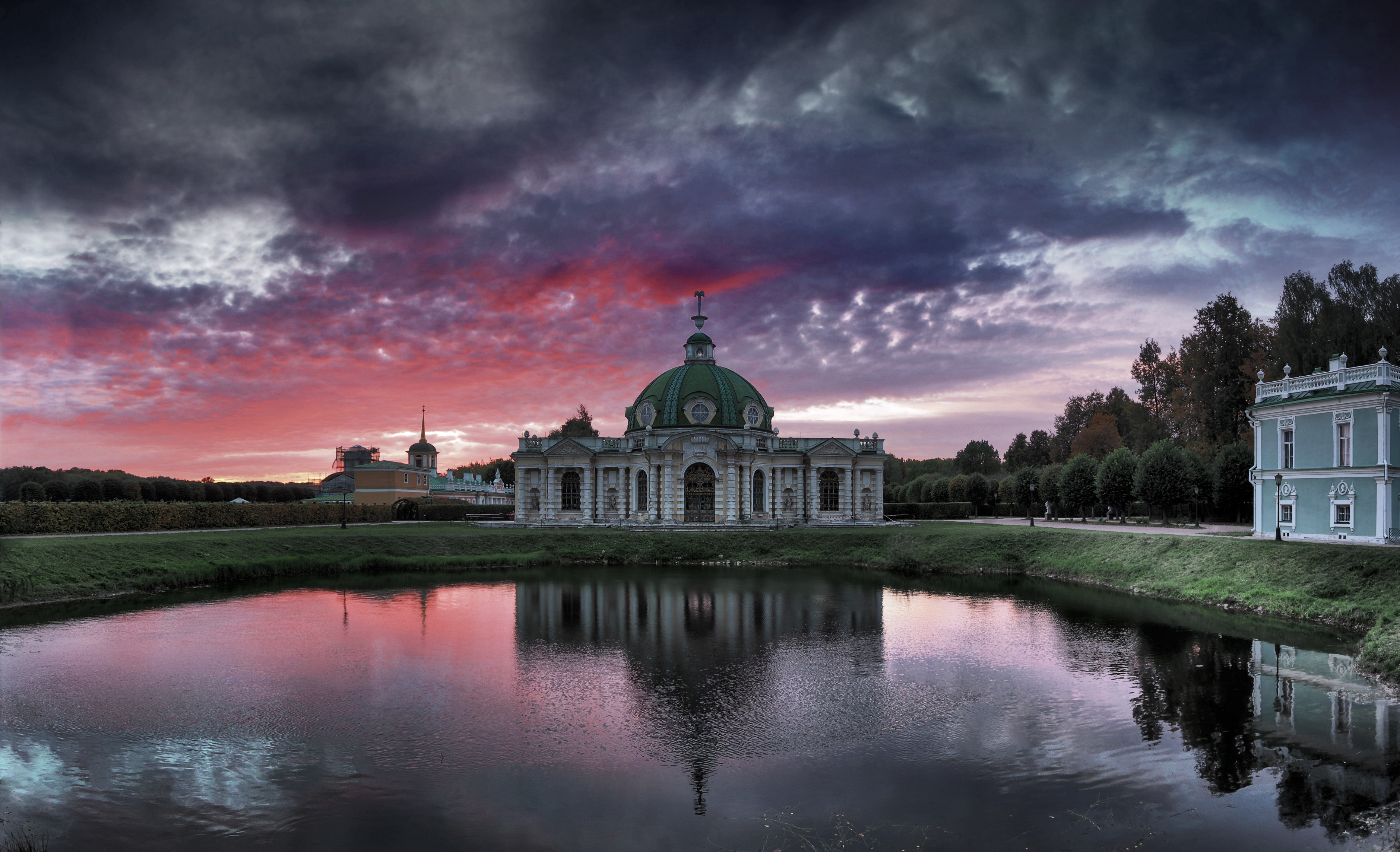 Грот: Юности ул., дом 2, строение 11, Вешняки, Восточный округ, Москва